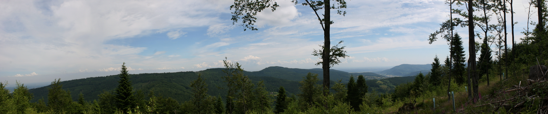 Panorama ze zbocza Sokołówki